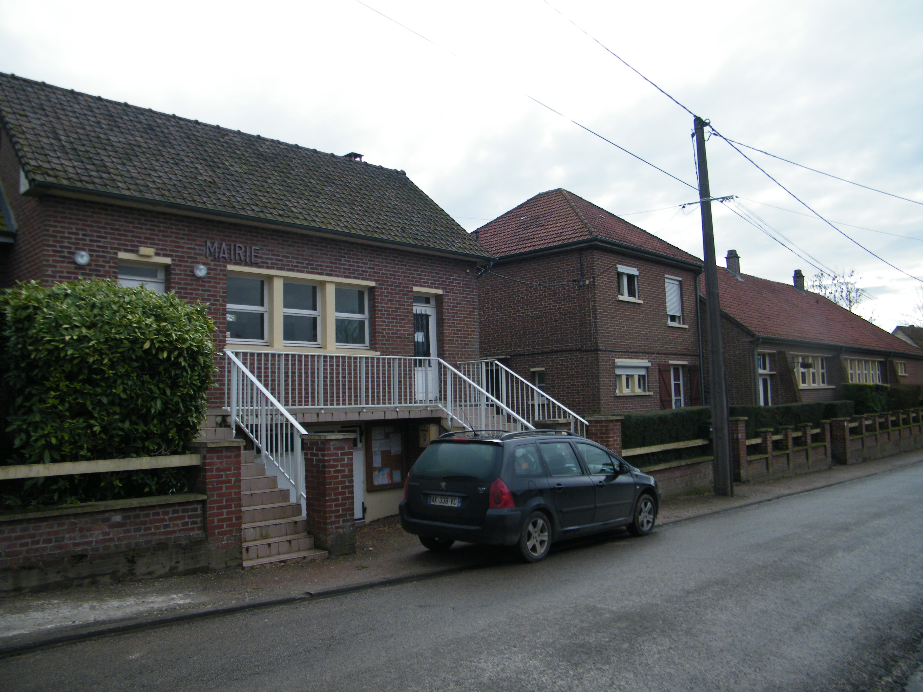 Mairie et école.